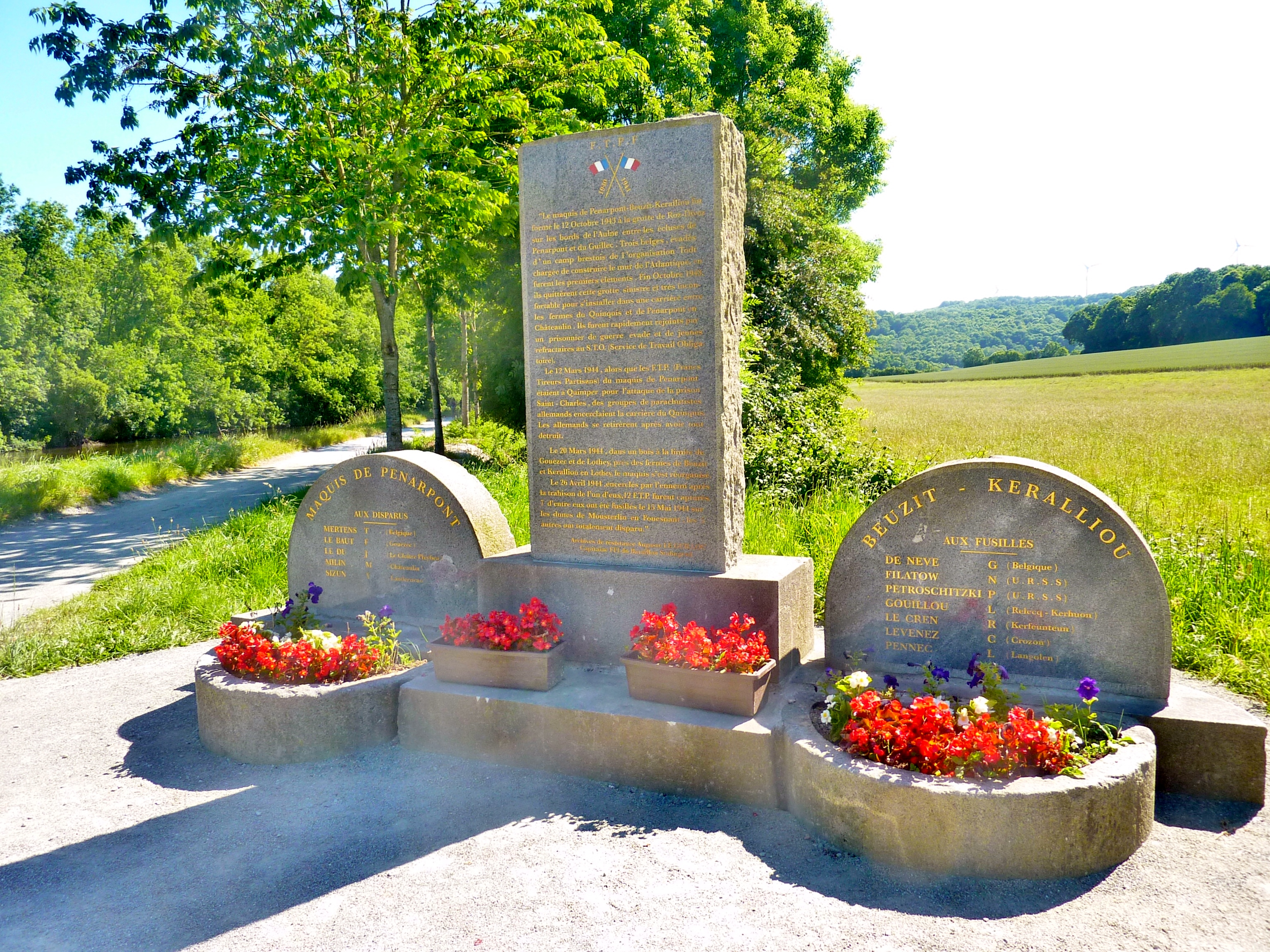 La stèle commémorative du maquis de Penarpont, sur les bords de l'Aulne (Canal de Nantes à Brest, écluse de Penarpont)